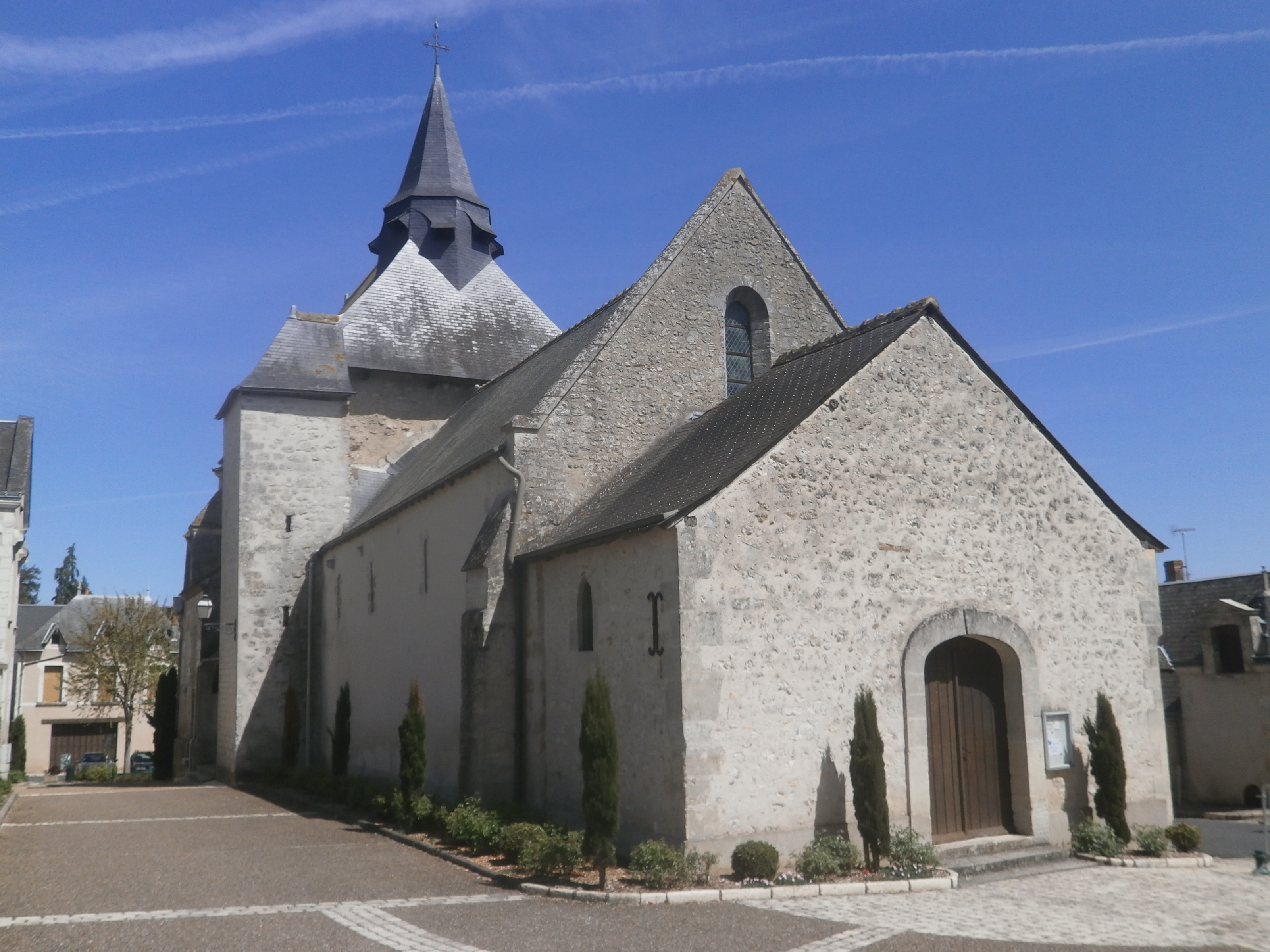 L'église de Cangey